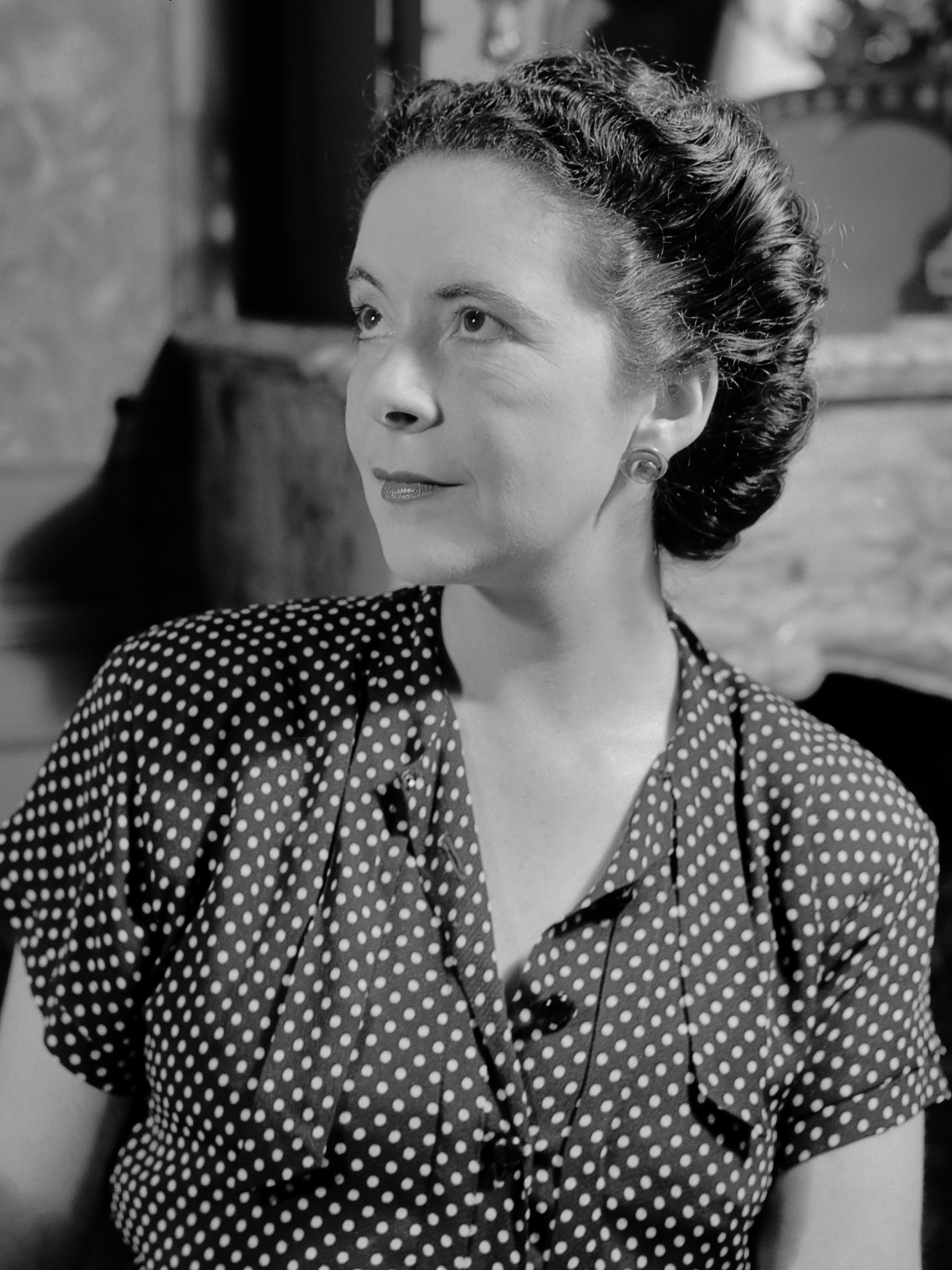 Mevrouw Goudstikker 30 juli 1946